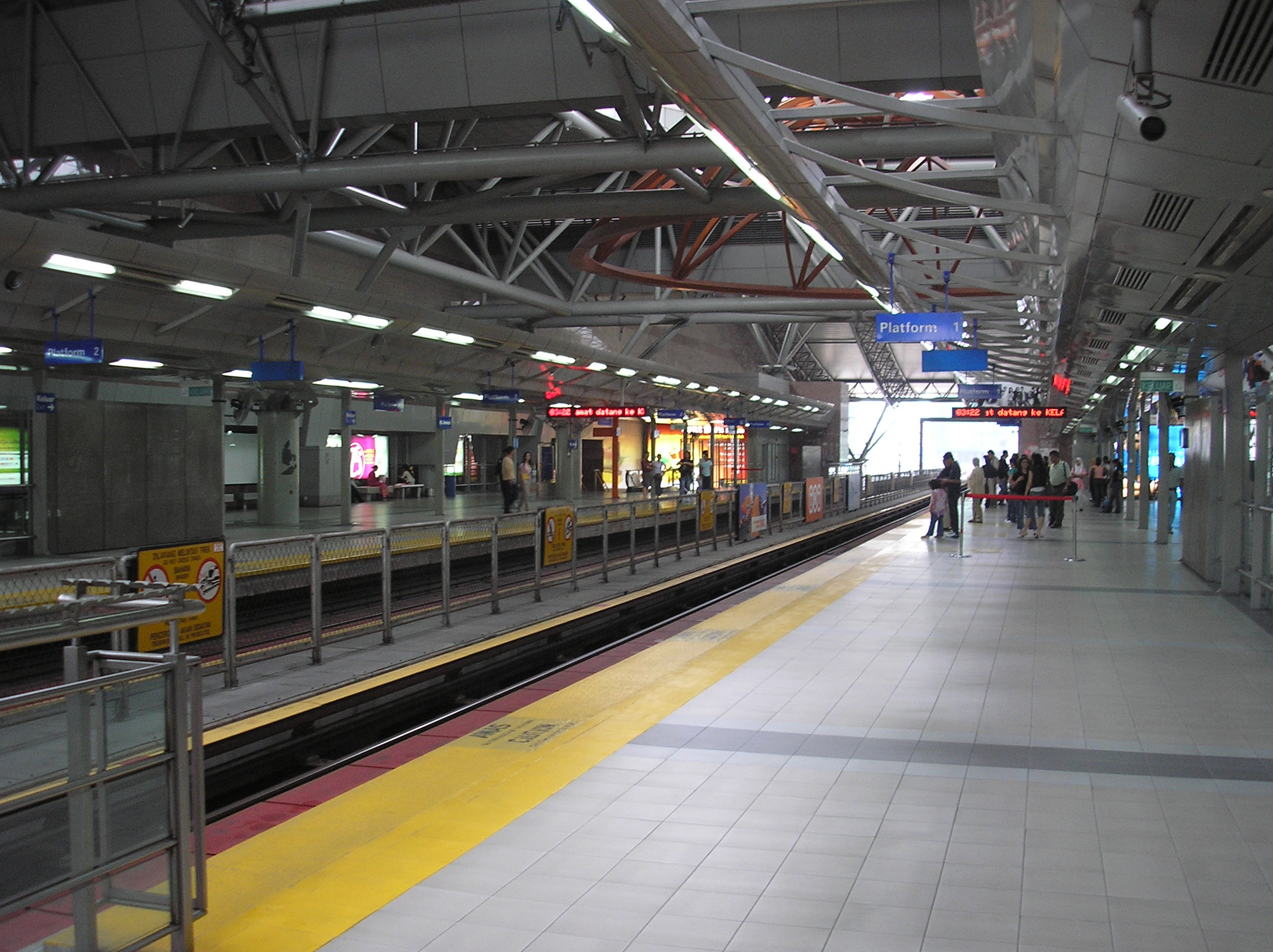 The Kuala Lumpur Sentral LRT station (Kelana Jaya Line) in Kuala Lumpur Sentral, Kuala Lumpur, Malaysia.